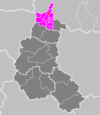 Maps of arrondissements and cantons of France: Arrondissement de Charleville-Mézières - Canton de Revin.PNG